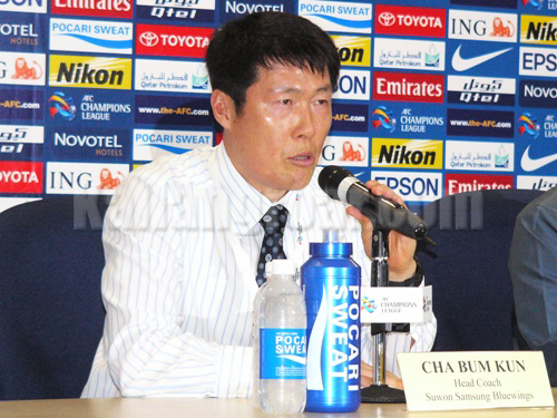 ACL 2009 SAFFC vs Suwon Samsung Bluewings, 18 March.jpg